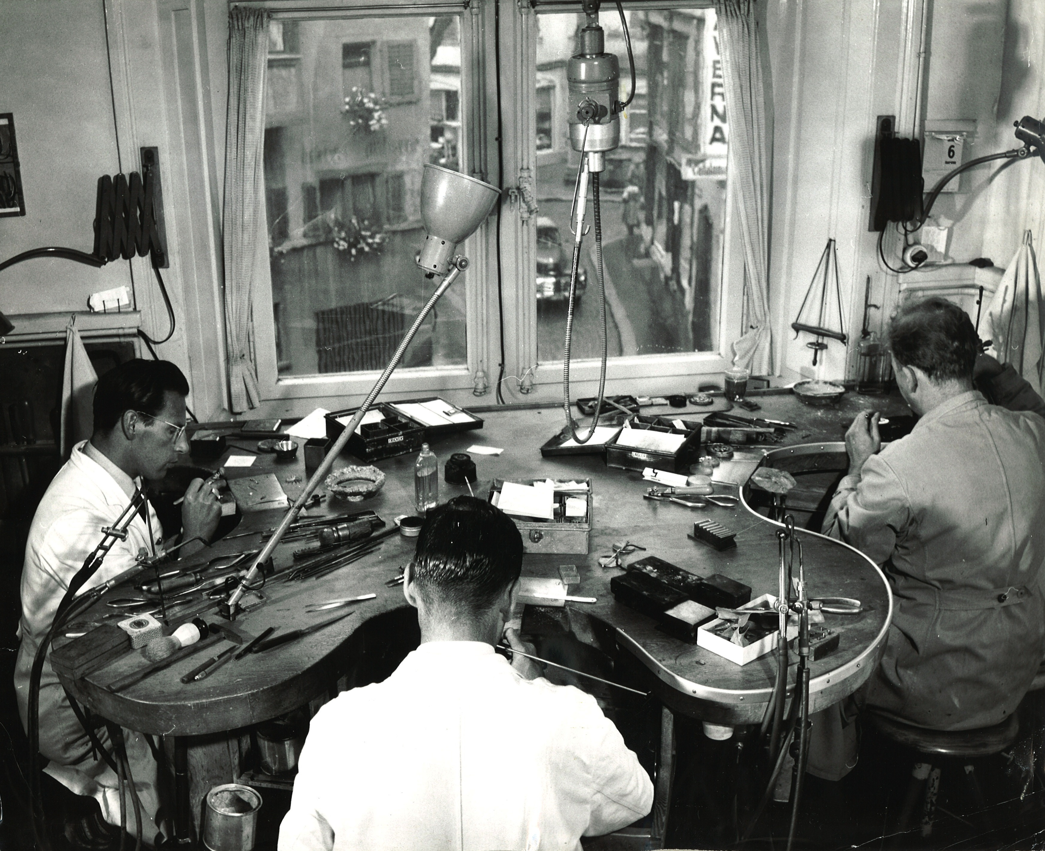 Aufnahme der Zürcher Werkstatt Burch-Korrodi um 1934